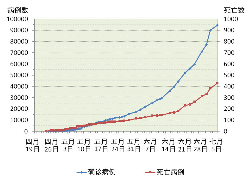 甲型H1N1流感2009大爆发病例